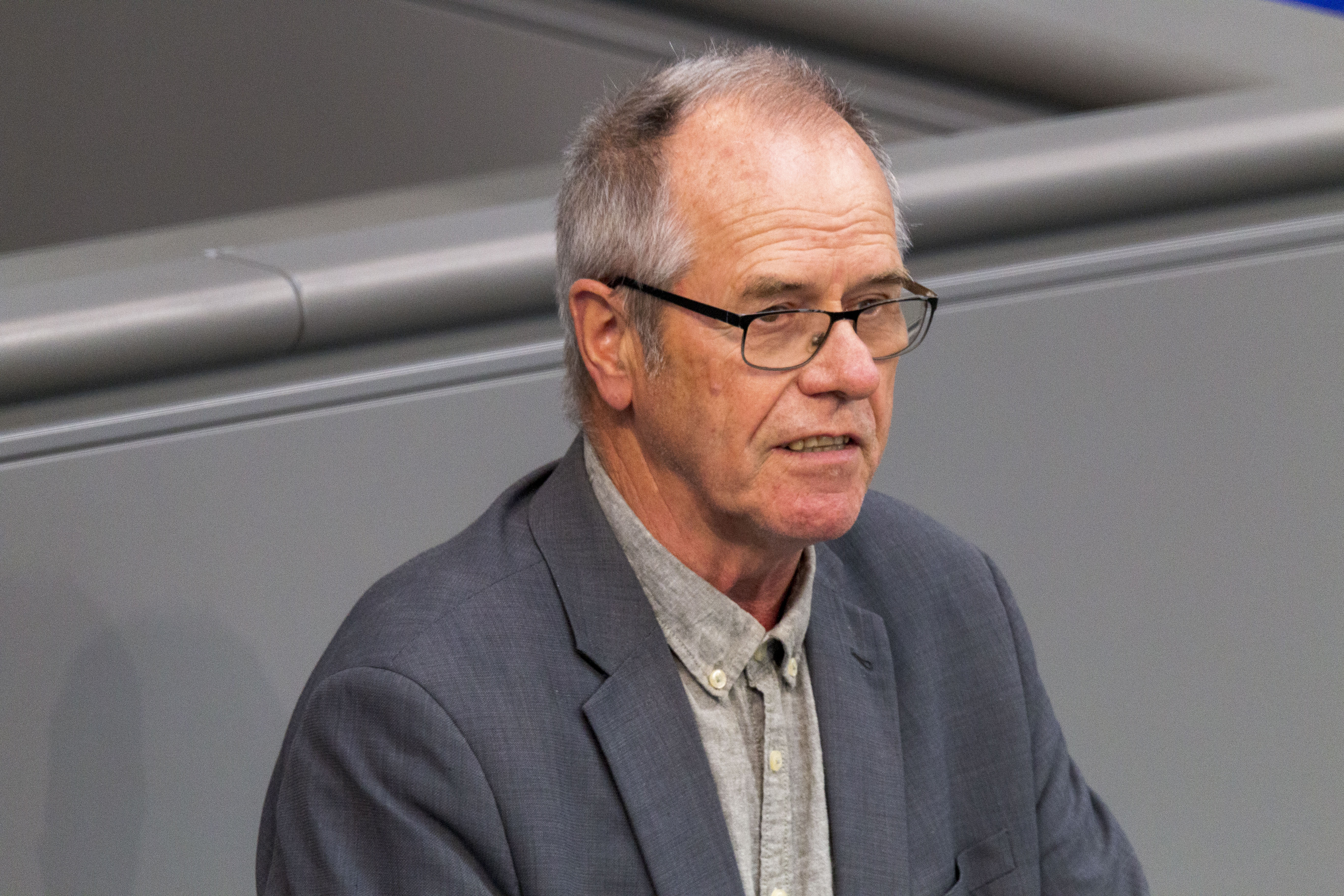 Friedrich Ostendorff, Bundestagsabgeordneter der GRÜMEM während der Plenarsitzung des Deutschen Bundestages am 2. Juli 2020 in Berlin.